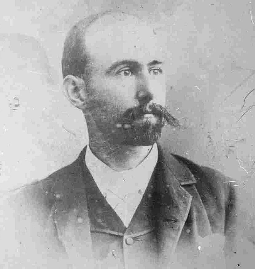 Hijo de Michael Daniel Jones, Bodiwan, emigró a la Patagonia, ingeniero y agrimensor, murió asesinado por integrantes de la banda de Butch Cassidy en Arroyo Pescado.